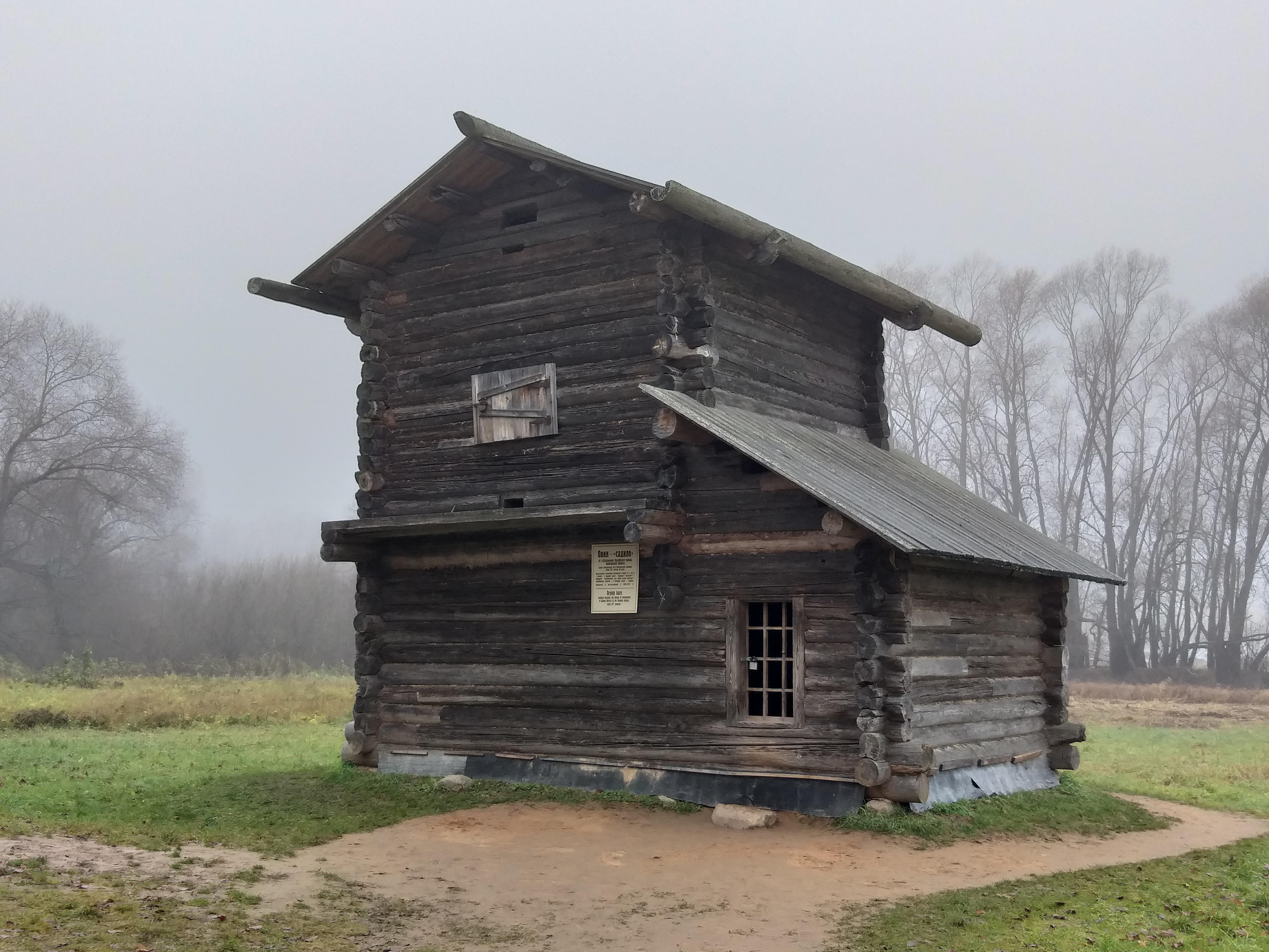 Овин-садило в музее Витославлицы (Великий Новгород)